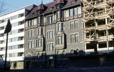 Purettu Necken-kerrostalo Helsingin Siltasaaressa